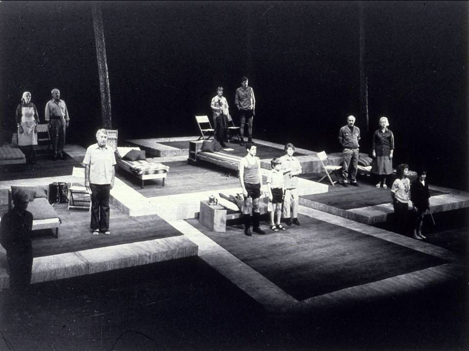 מקום אחר